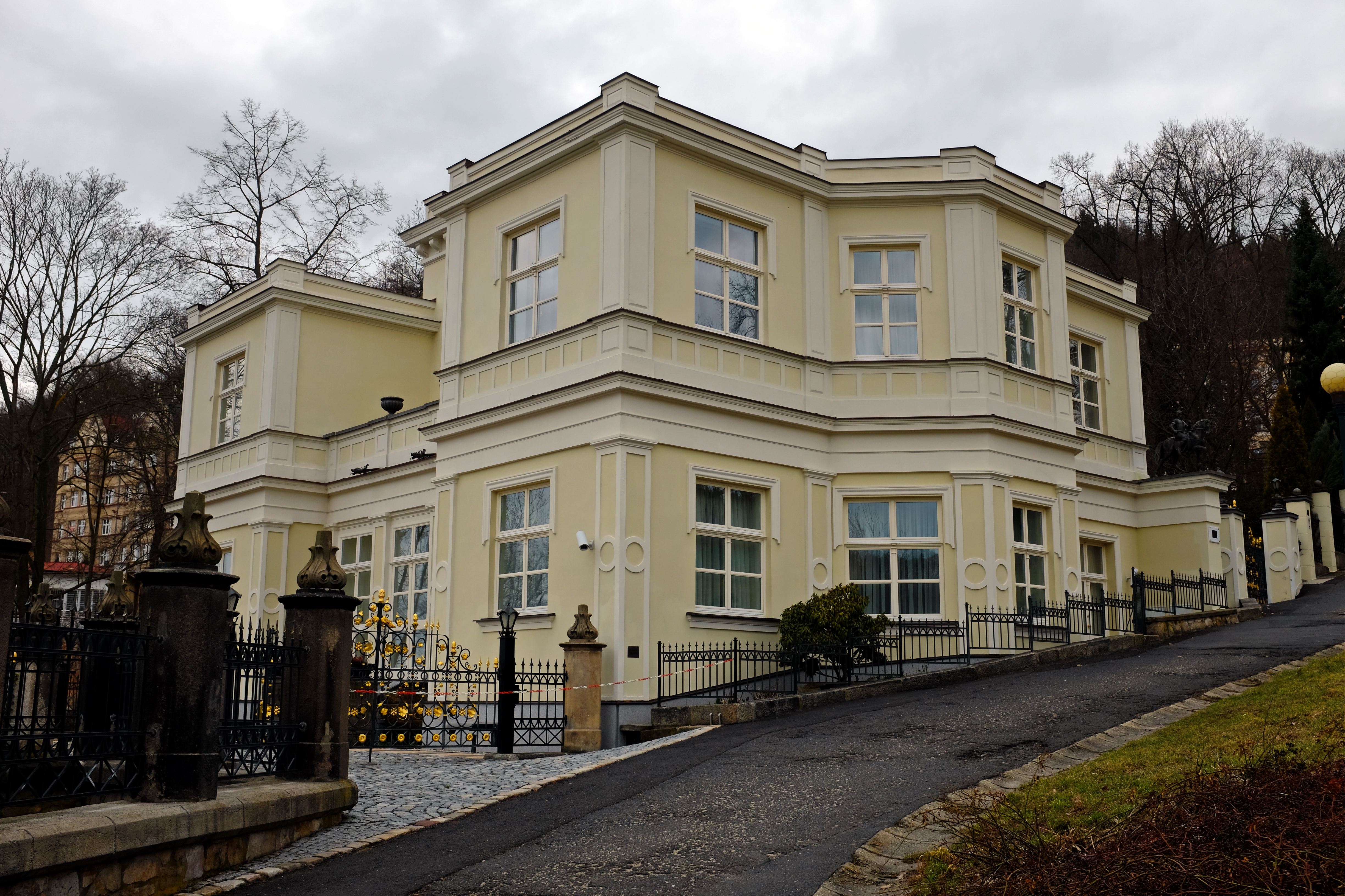 Lützowova vila, stezka Jeana De Carro 542/5, Karlovy Vary.